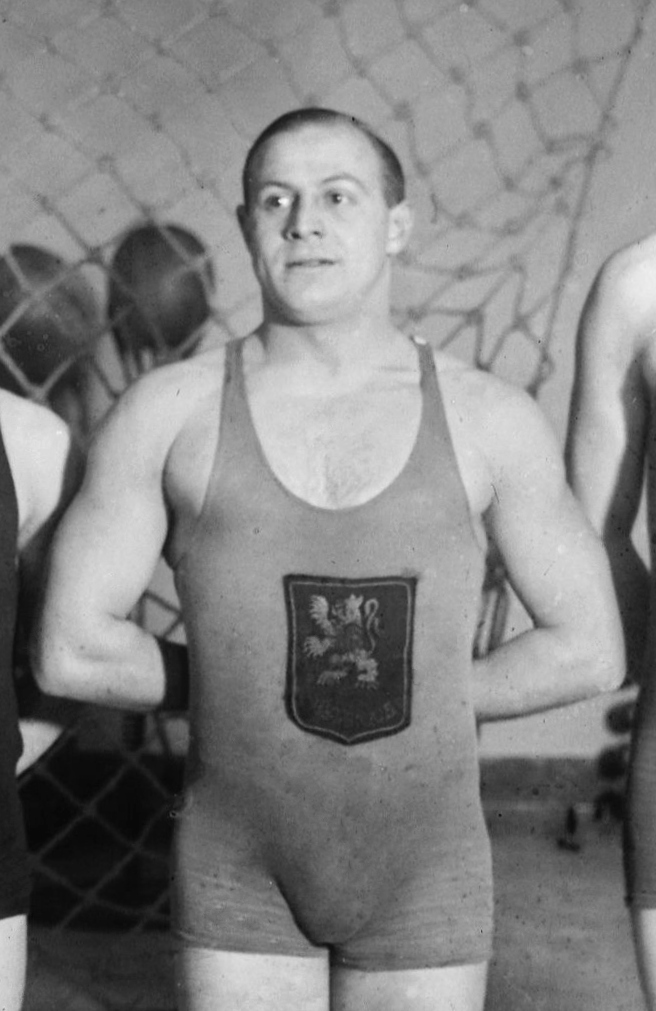 30-12-22, match France-Belgique, équipe de relais belge René Bauwens: [photographie de presse] / [Agence Rol]